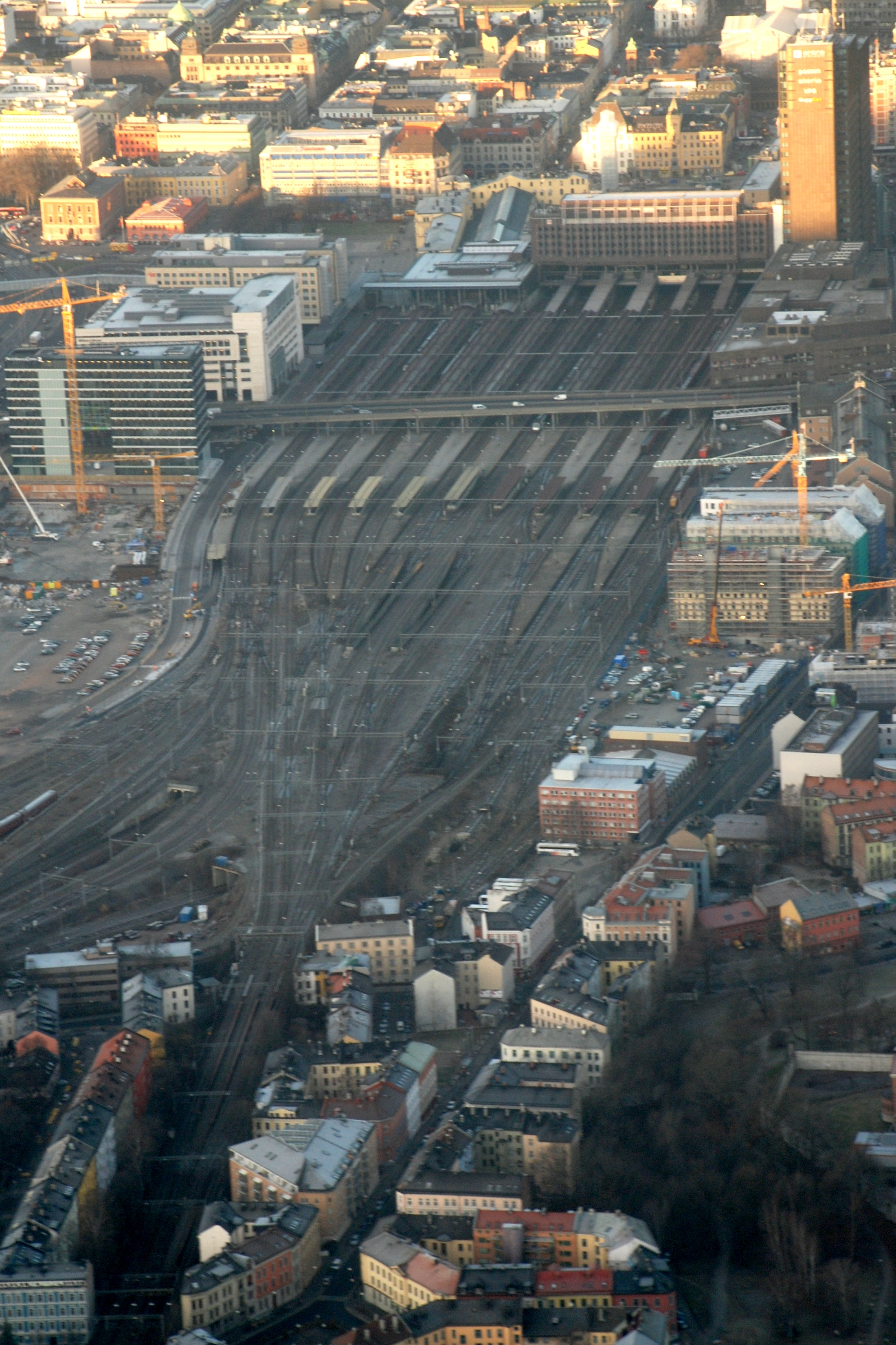 Oslo Sentralstasjon sett fra luften.